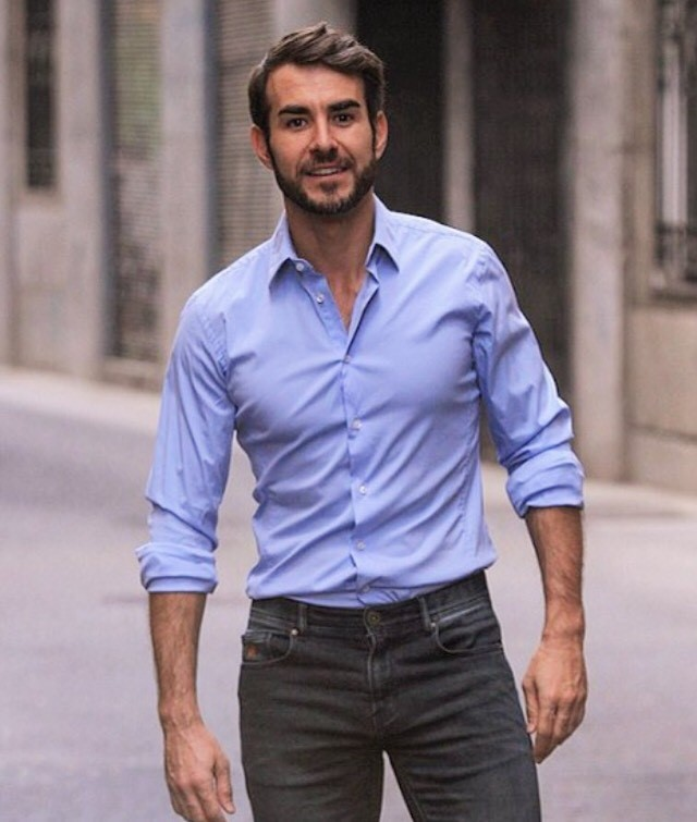 Dani Muriel